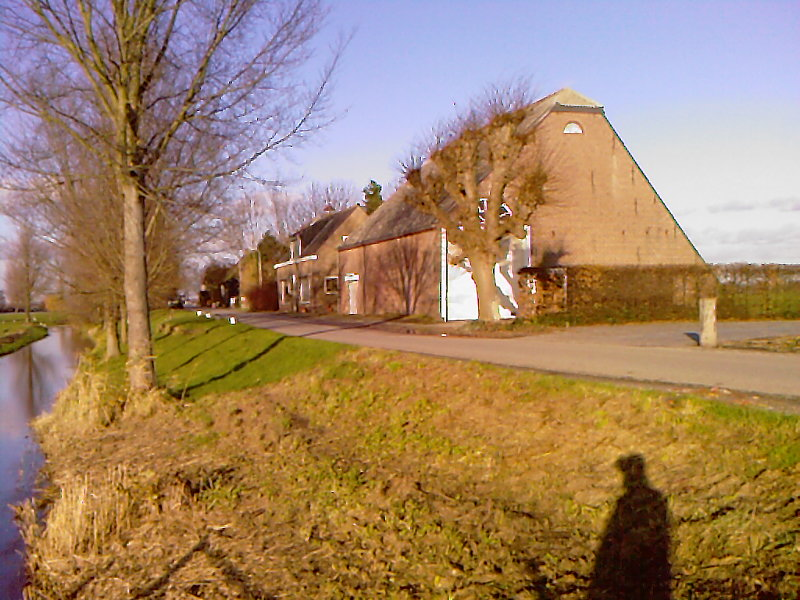 Een deel van Zwanegat, gemeente Binnenmaas